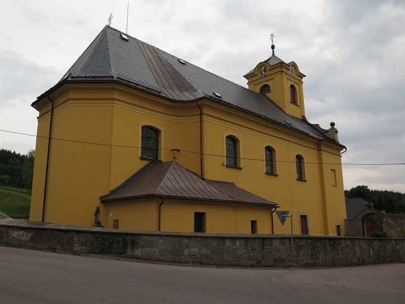 Kostel svatého Vavřince, Čenkovice.